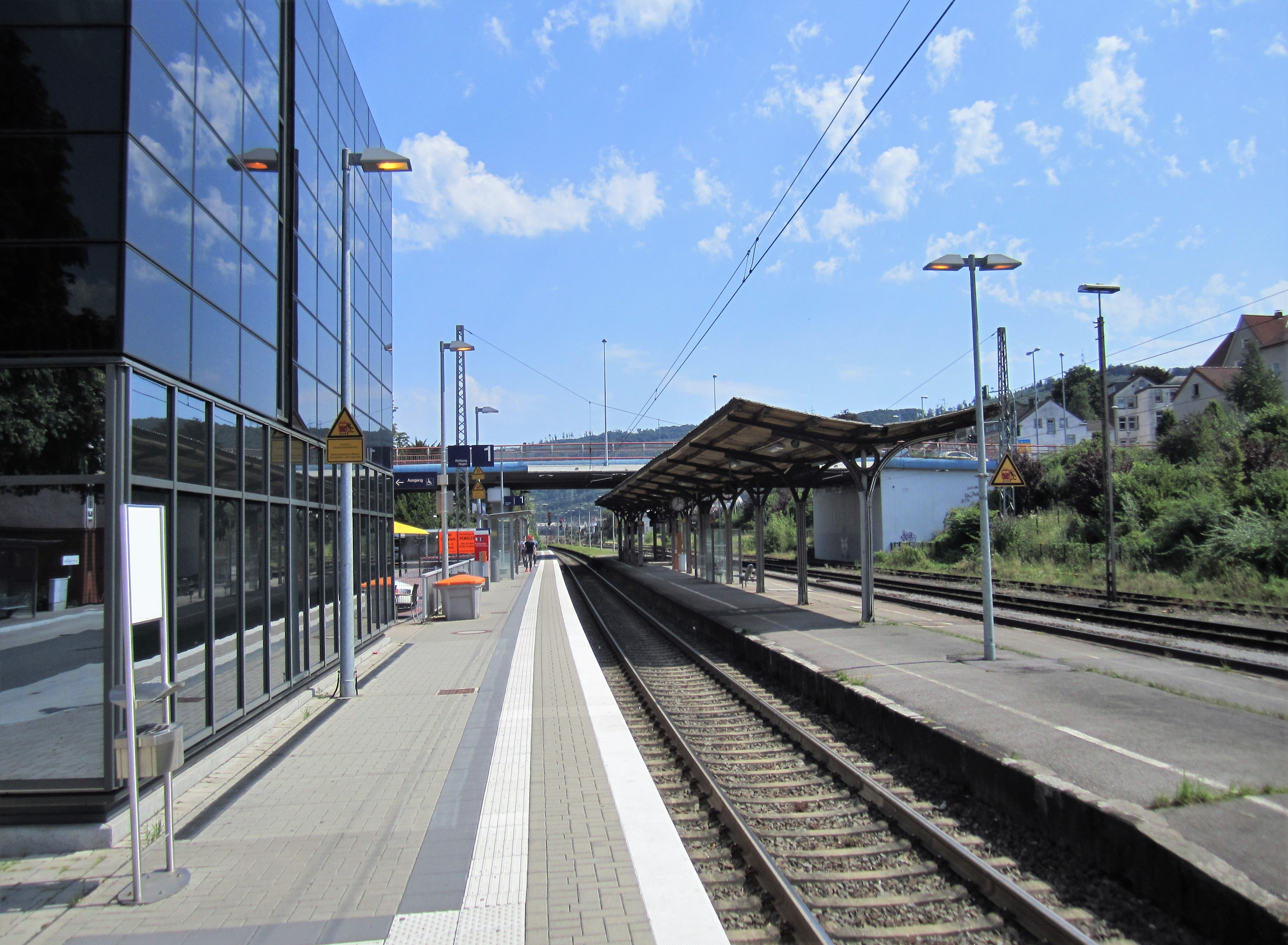 Bahnhof an der Ruhr-Sieg-Strecke im Hagener Stadtteil Hohenlimburg, Bahnstraße. Nach dem Abriss des Bahnhofsgebäude 2011 wurde ein Bahnsteig-Bahnhof ohne Gebäude errichtet. Auf dem Foto links Gleis 1 Richtung Hagen, rechts Gleis 2 Richtung Siegen. In dem Glaskubus-Gebäude befindet sich ein Café. Im Hintergrund die 2009 eröffnete Straßenbrücke über die Bahnlinie, sie ersetzte mit ihrem Bau den beschrankten Straßenübergang Herrenstraße und löste damit ein großes Hohenlimburger Verkehrsproblem.